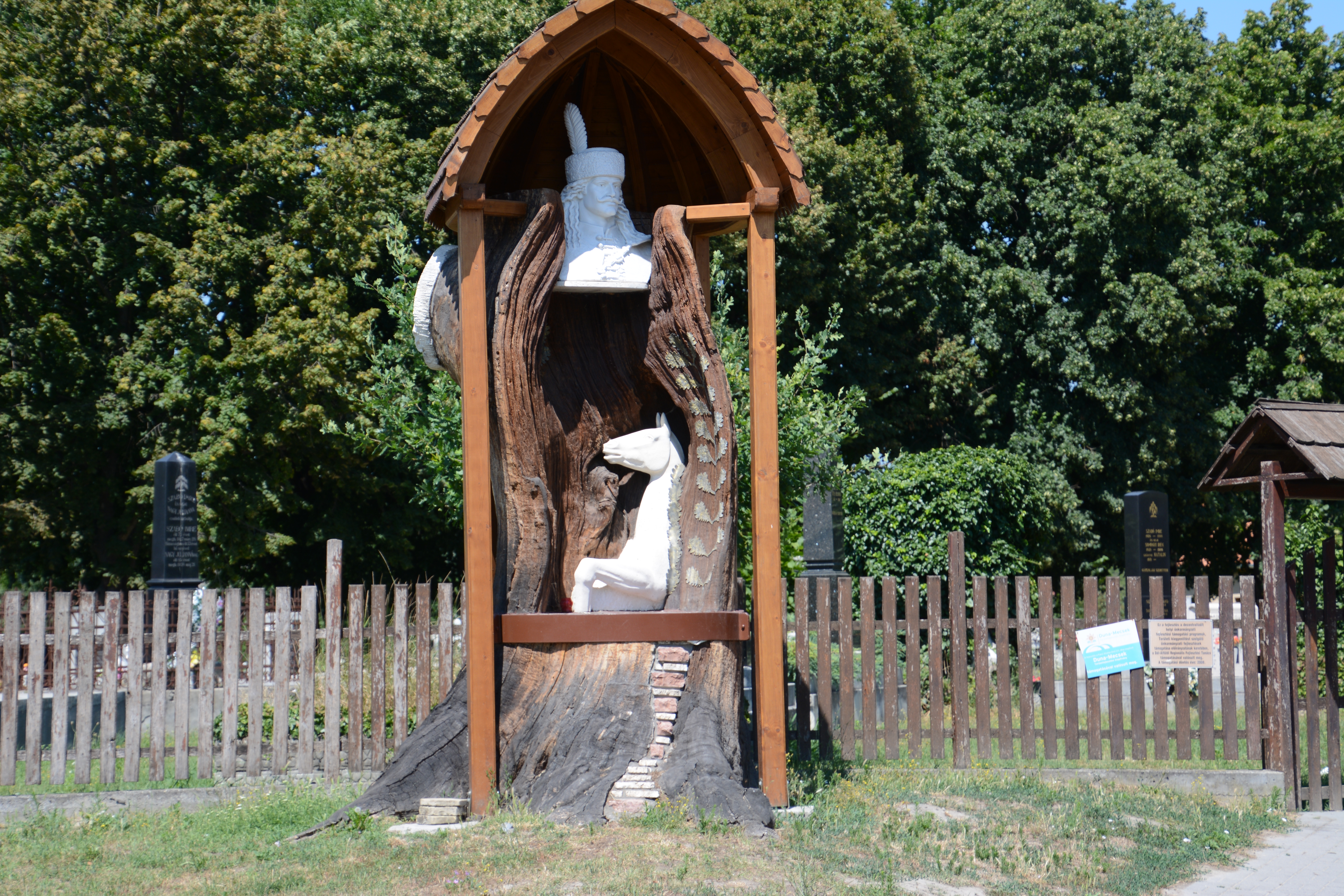 emlékhely